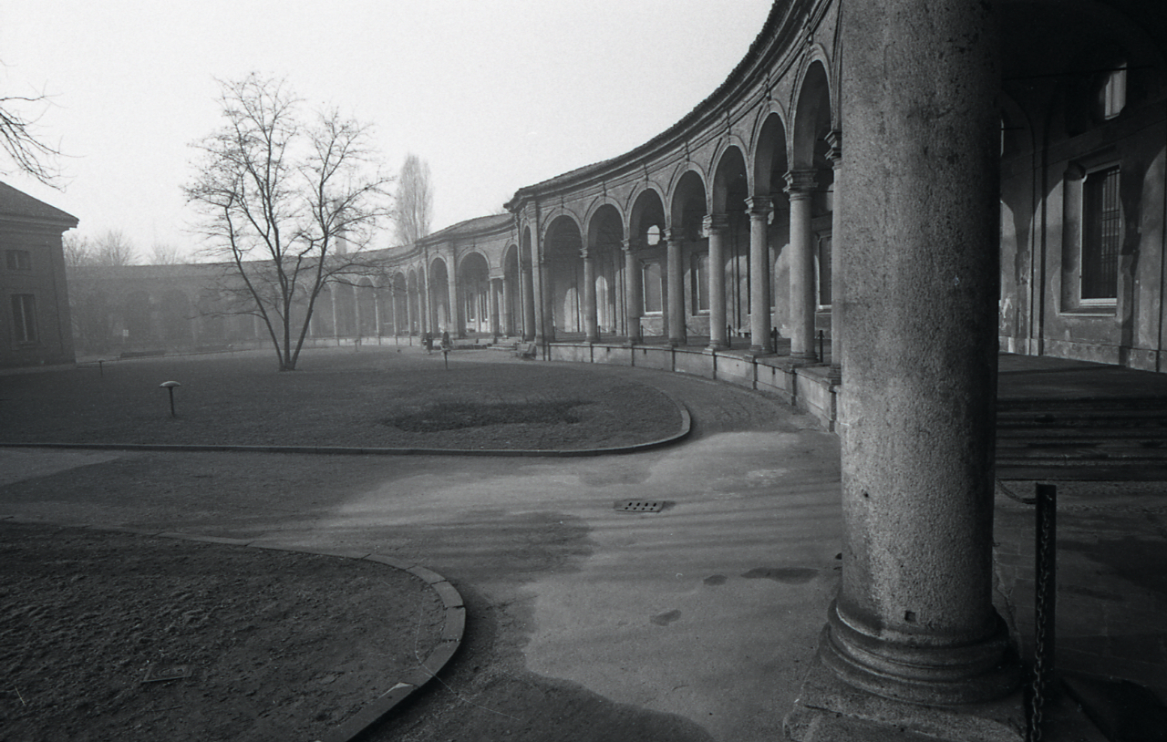 Serie fotografica : Milano, 1967 / Paolo Monti. - Strisce: 1, Fotogrammi complessivi: 3 : Negativo b/n, gelatina bromuro d'argento/ pellicola ; 35 mm. - ((I fotogrammi hanno una doppia numerazione. . - Sul portanegativi: Leica M 21 mm Adox 21